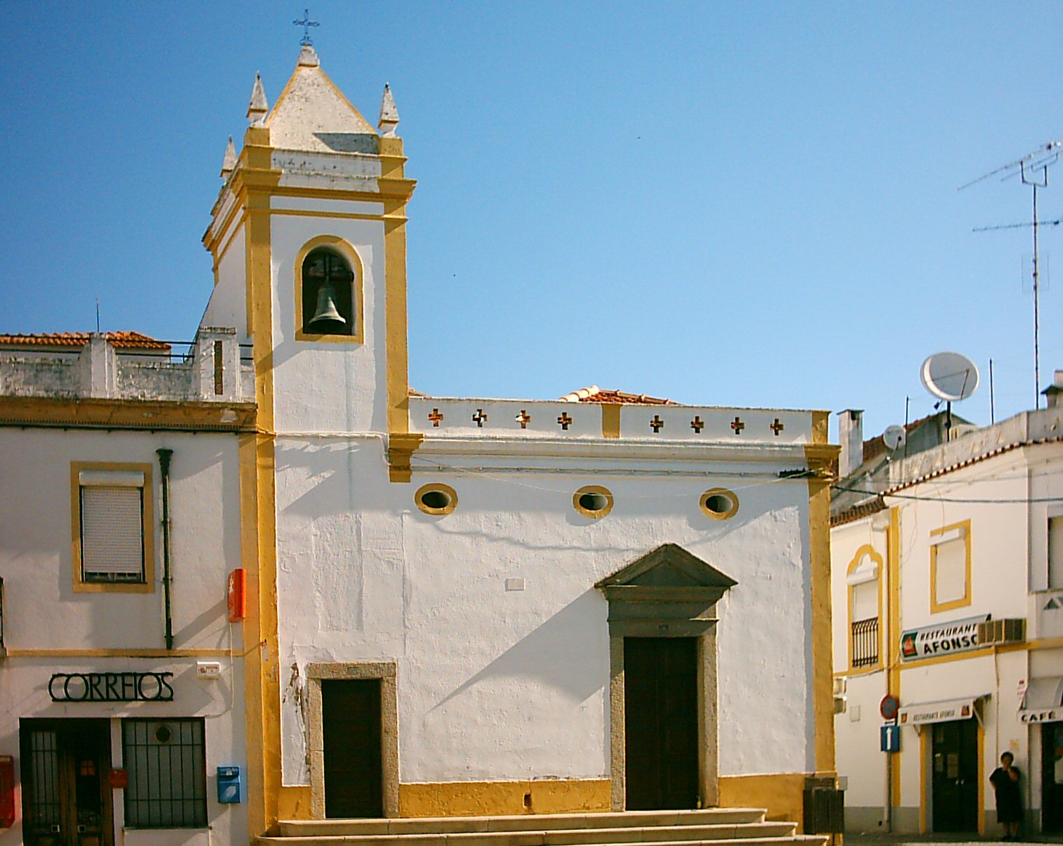 Igreja da Misericórdia de Mora, Portugal